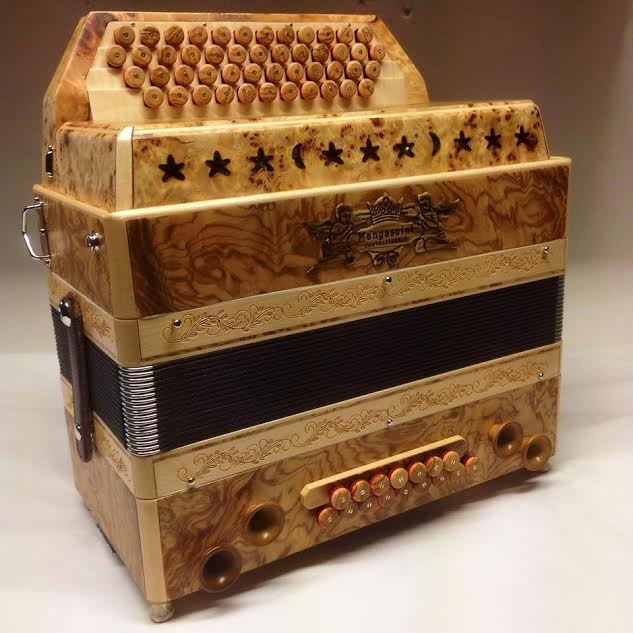 Mengasini